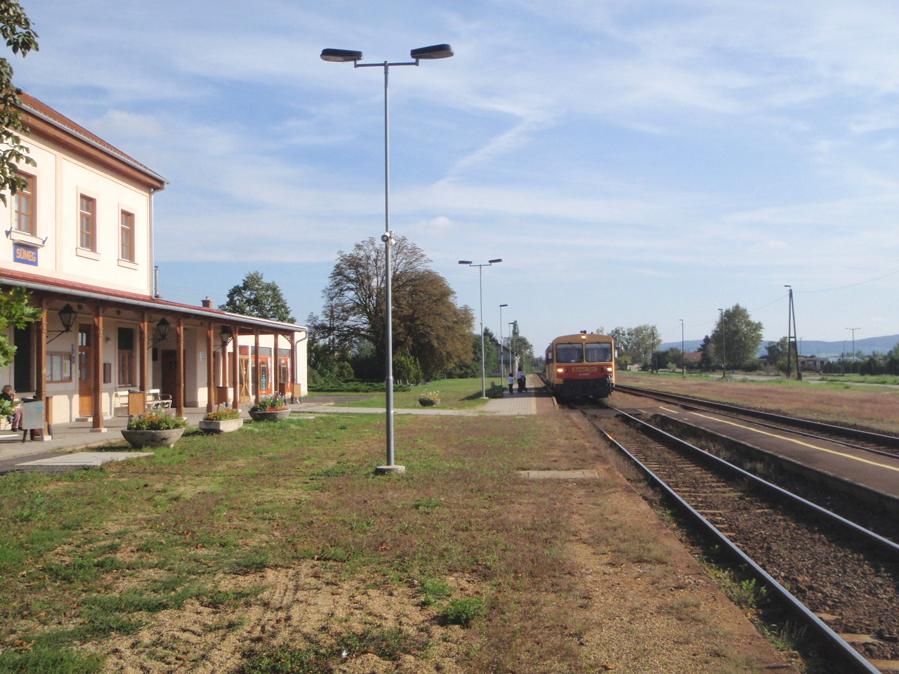 Bahnhof Sümeg